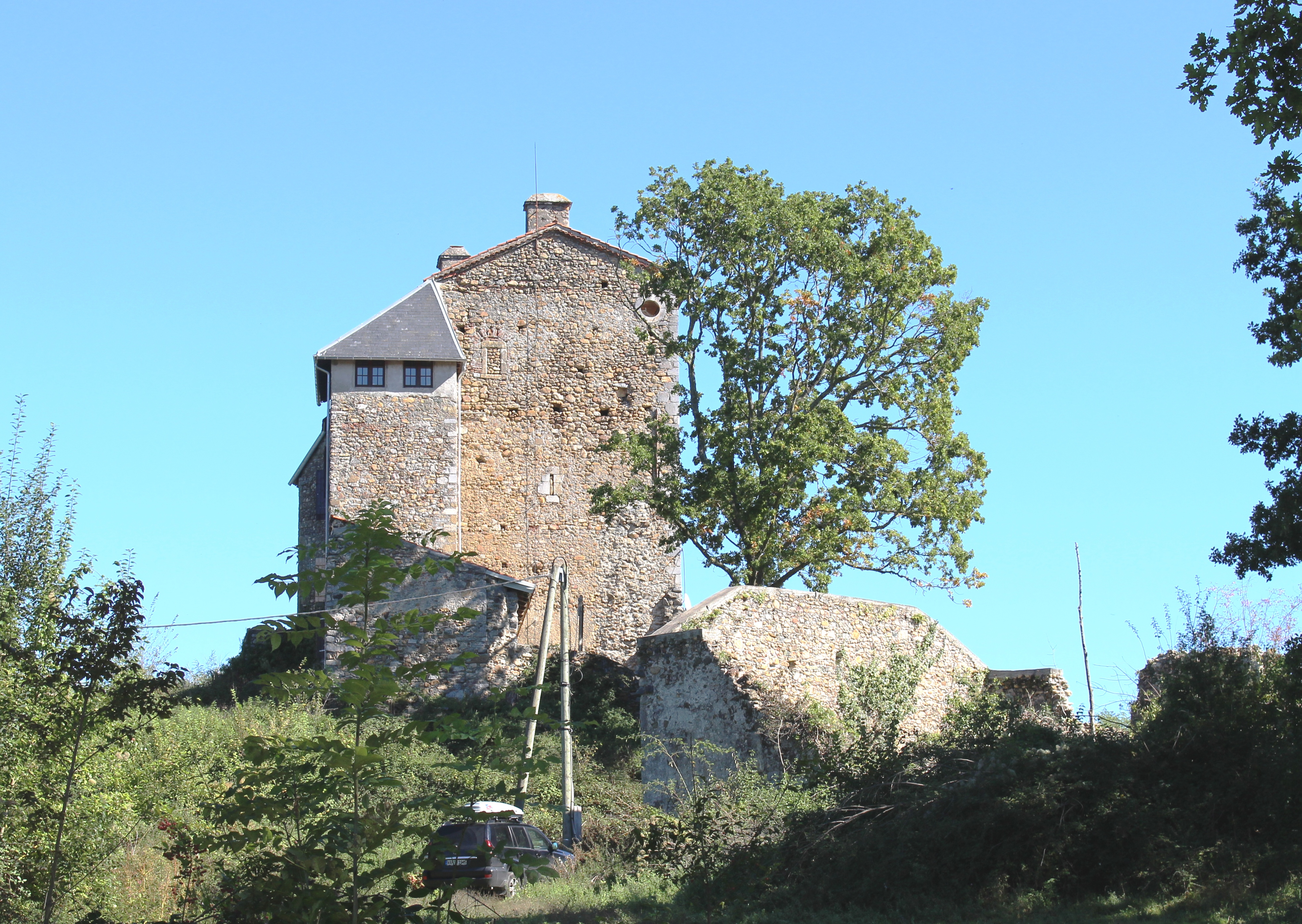 Château de Montégut (Hautes-Pyrénées)